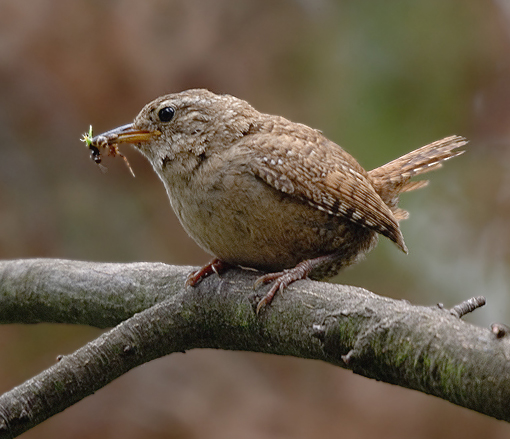 Крапивник